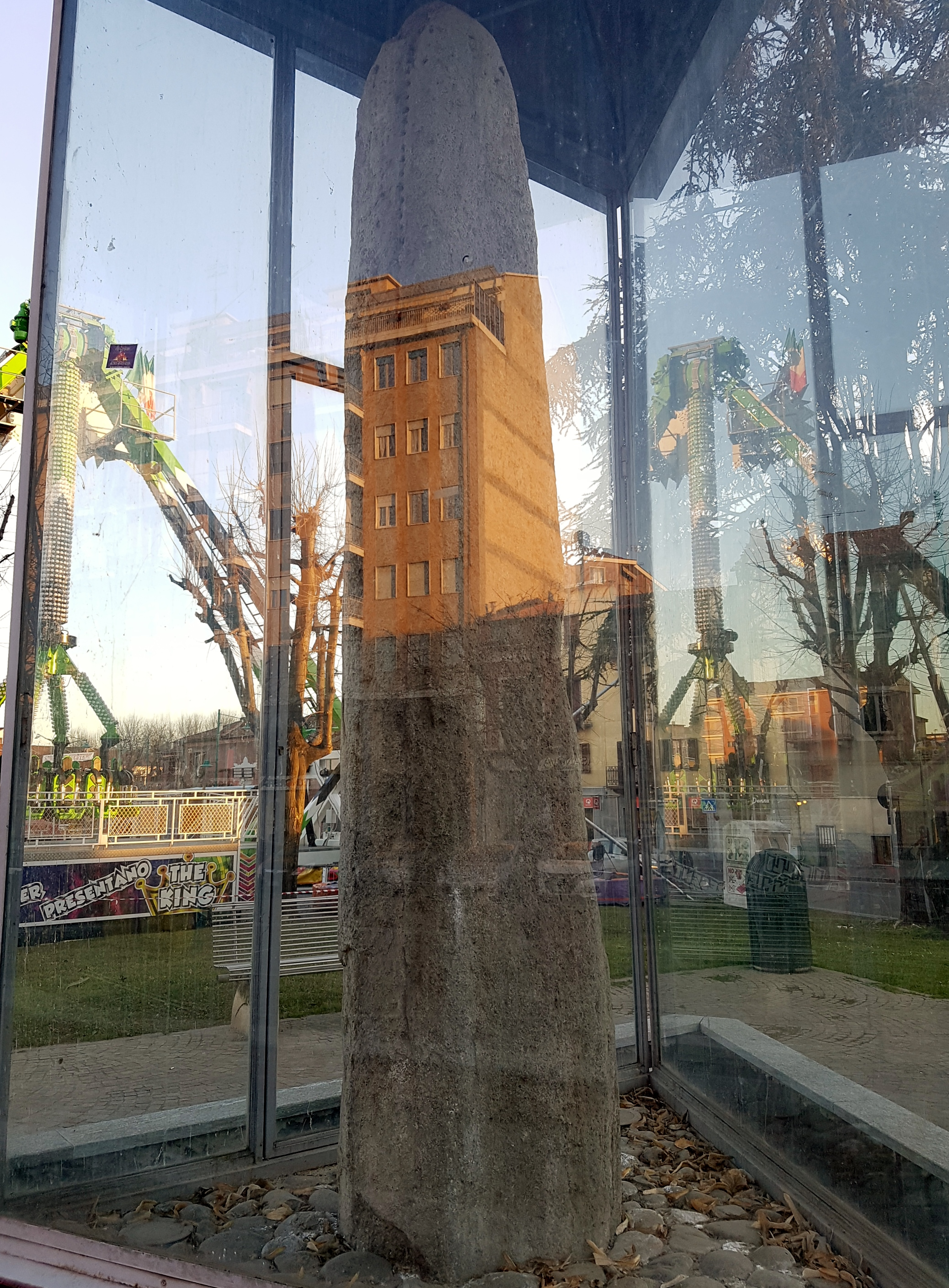 Lapis Longus, VII-VI sec. AC, Chivasso, Piemonte